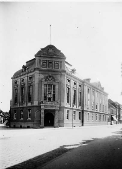 Fotografie Ferdinand Düstersieks der Fürst Leopold-Akademie für Verwaltungswissenschaften (Lange Straße 73 in Detmold)